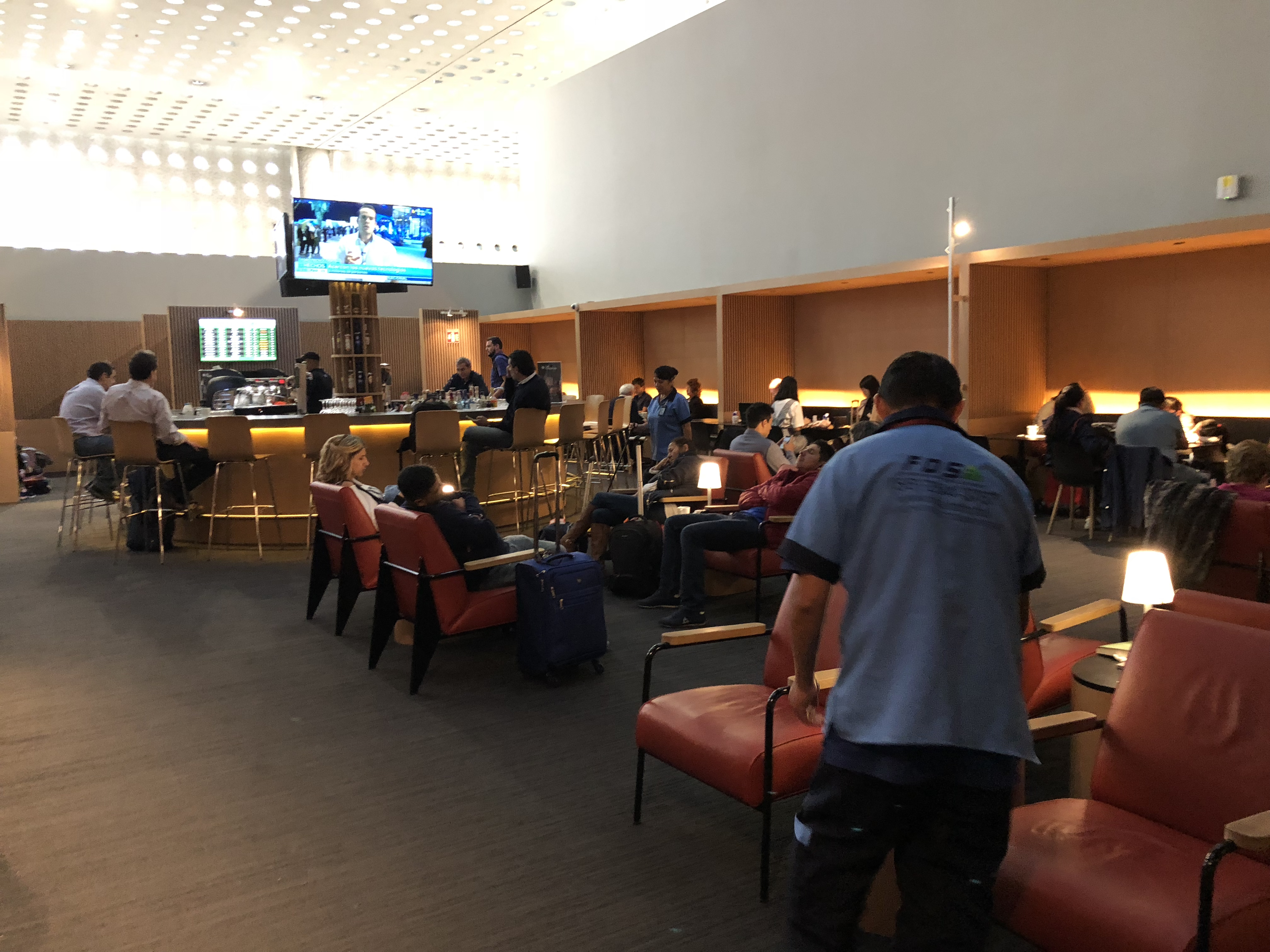 Interior del Salón Premier Internacional de Aeroméxico de la T2 de la Ciudad de México.